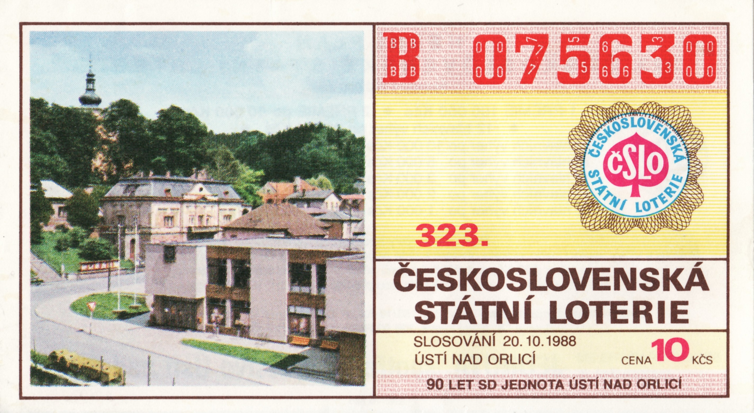 vývoj ČSLO